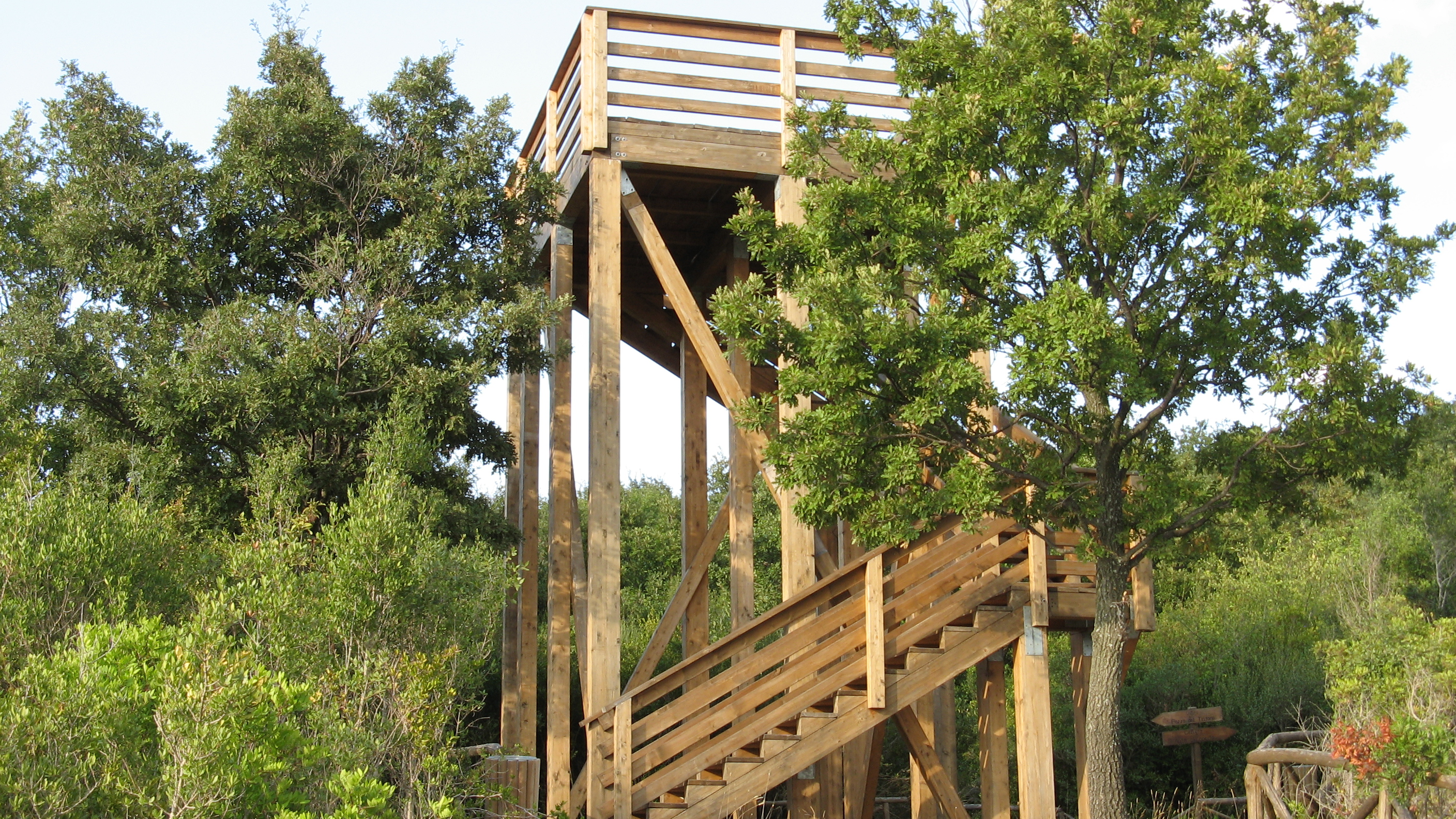 Torre panoramica realizzata dalla Comunità Montana Calore Salernitano all'interno dell'Oasi WWF Bosco Camerine in Albanella.